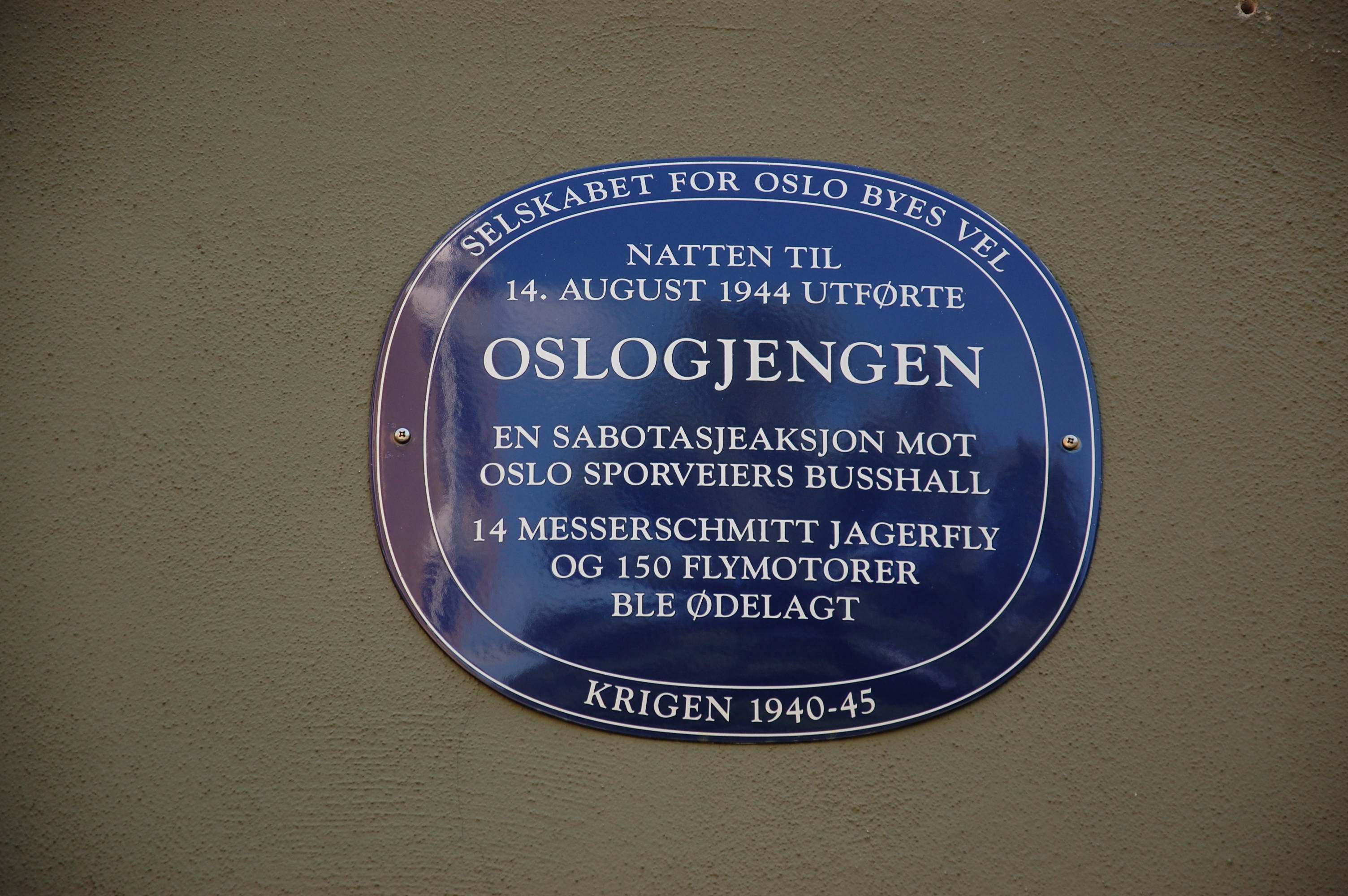 Oslo byes vel skilt på veggen på Bjølsenhallen.